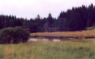 Rybníček U překopané hráze